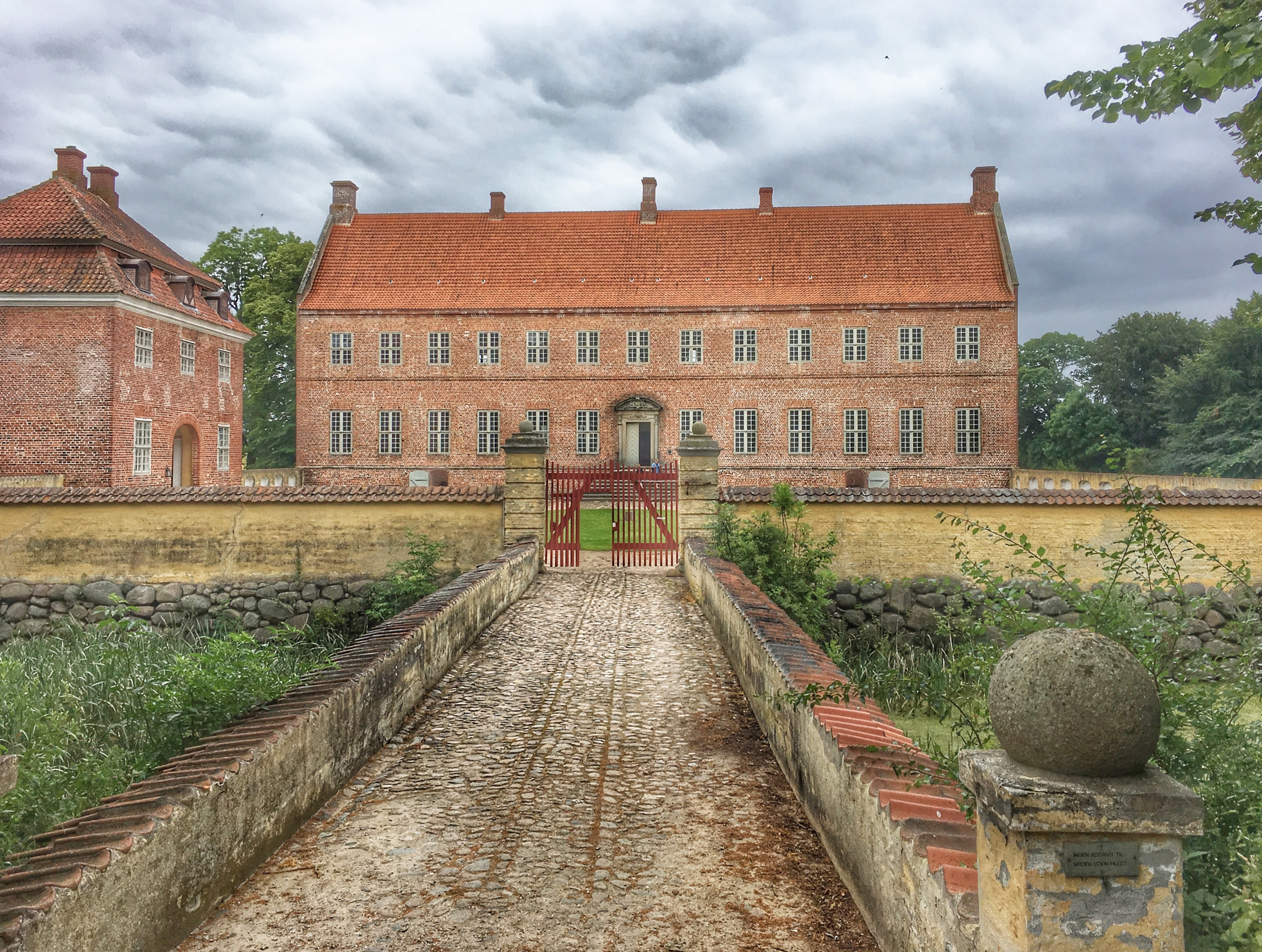 Selsø Herregård, Hornsherred, Sjælland